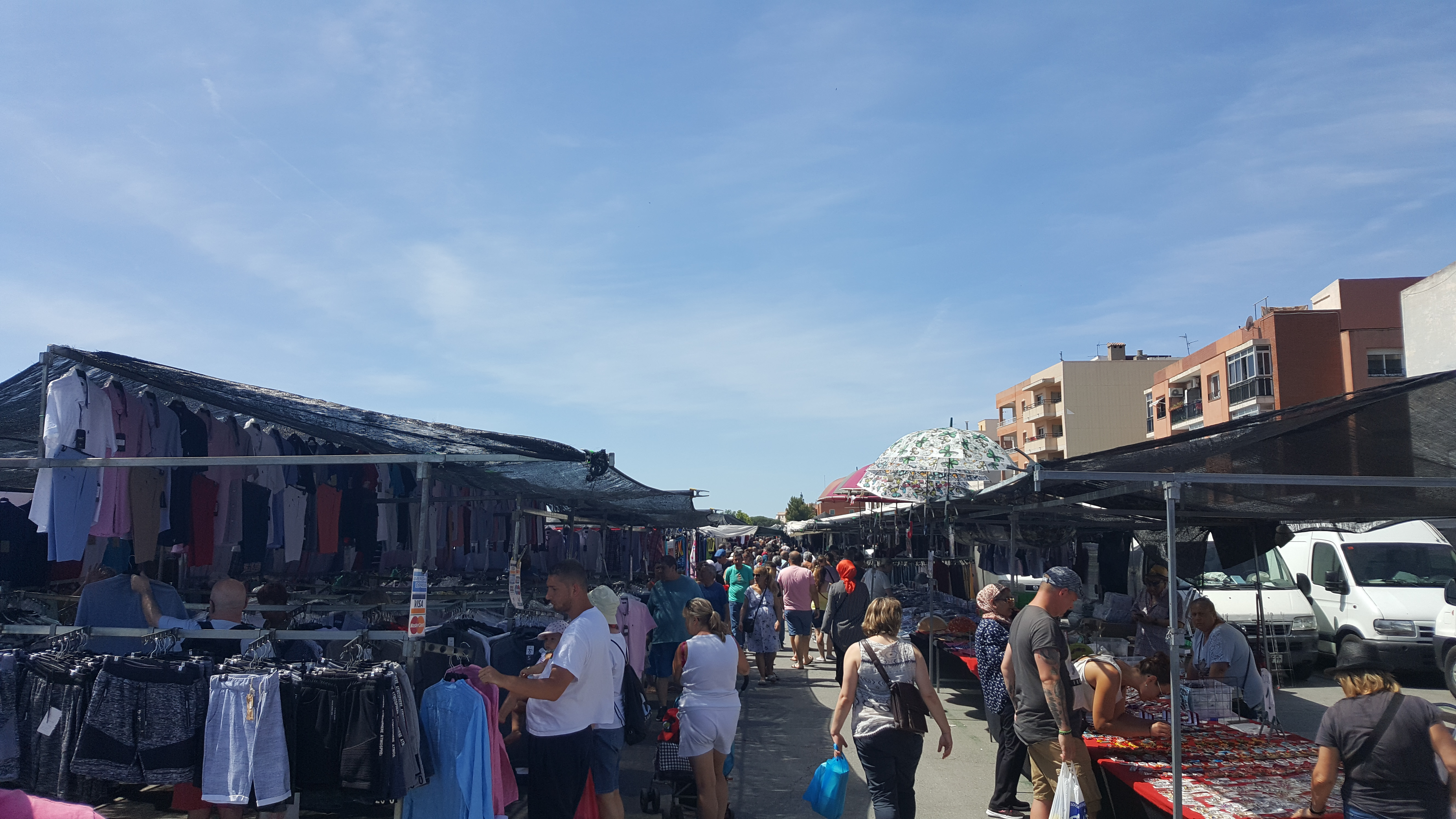 Mercat setmanal de Bonavista